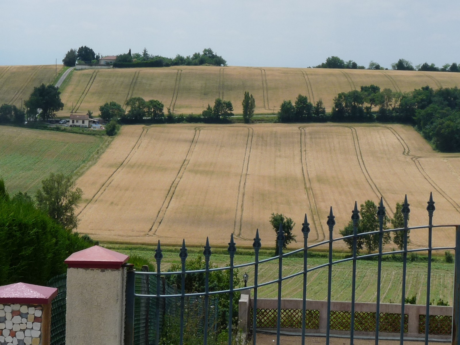 Vue depuis l'église vers le nord, Toutens, Haute-Garonne, France